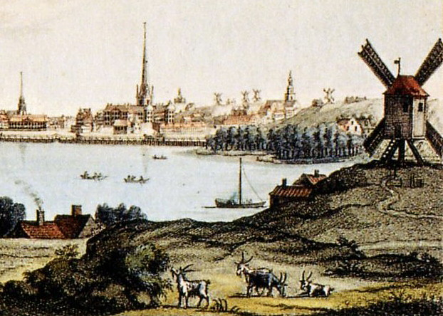 Del av " Panorama över Stockholm från Kungsholmen" med kvarnen "Lilla Munkan"